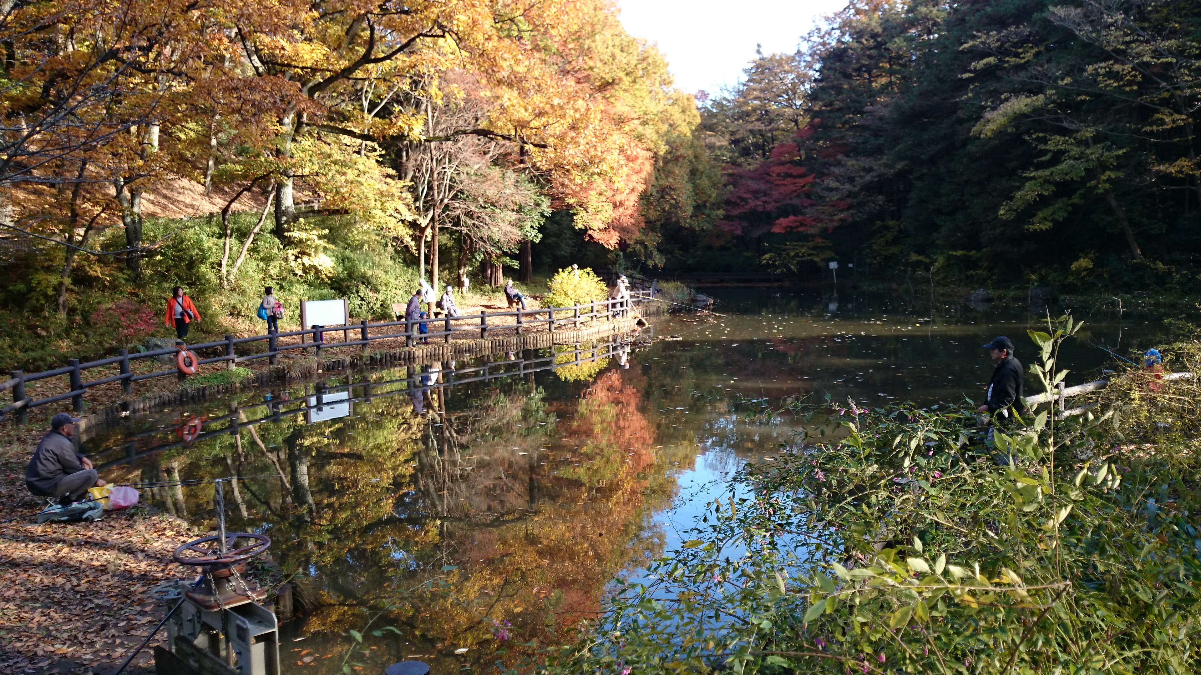 横浜市児童遊園地の池 横浜市保土ヶ谷区 NTTドコモ Xperia Z1fにて撮影